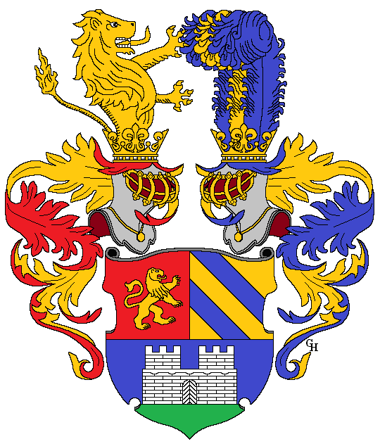 Wappen des österreichischen Leinwandhändlers Franz Huschka Ritter von Raschitzburg (1751–1830), Wohltäters der Ortschaft Grinzing in Wien. Zeichnung von Gerd Hruška (